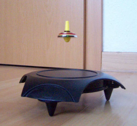 Картинката е фотография на левитрон. Спиново стабилизирана магнитна левитация. © 2007 Милко Куйлеков